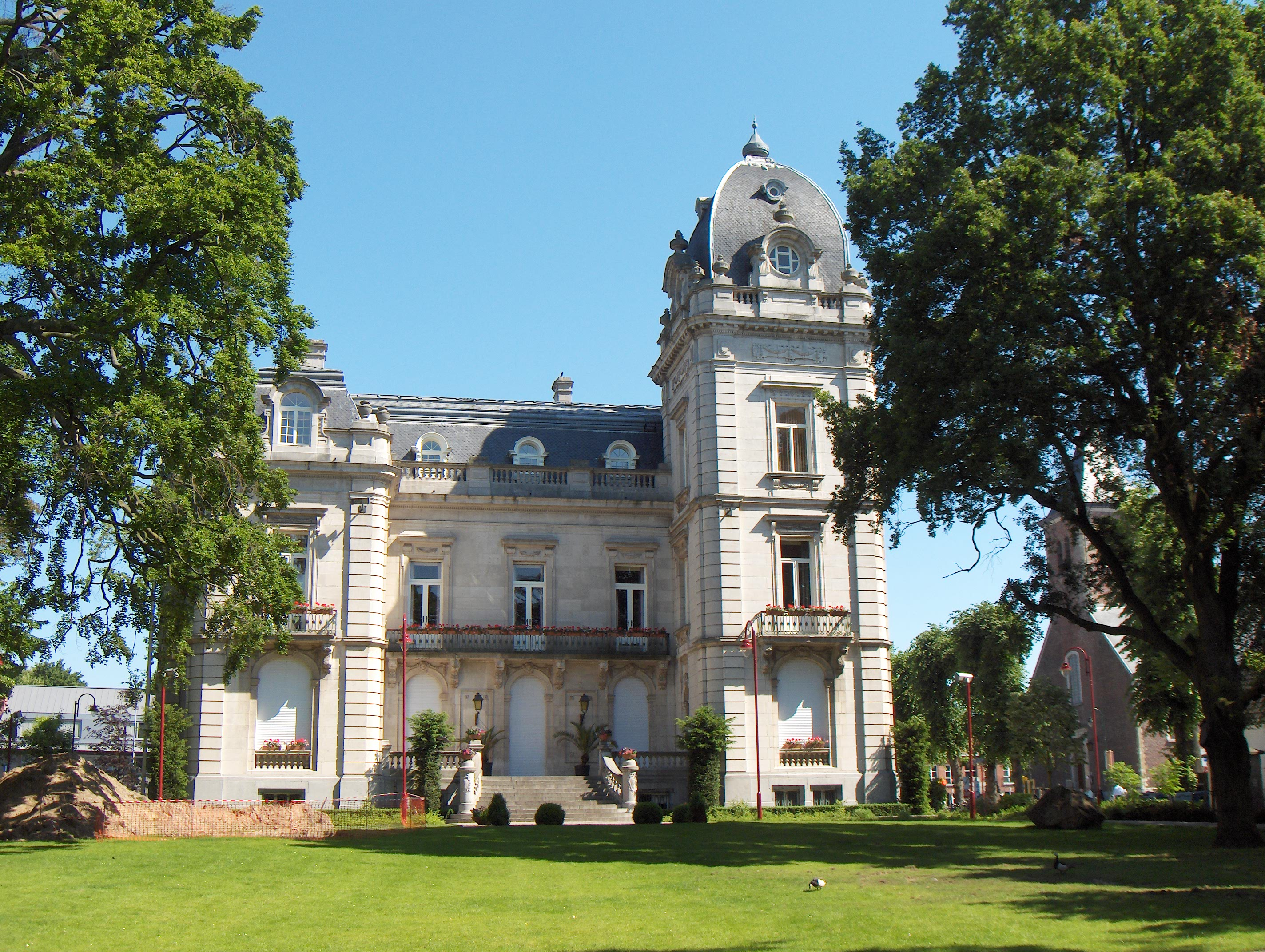 Beschreibung: Destelbergen (Belgien, Prov. Ostflandern), Rathaus (ehemaliges Schloss Van Acker, ca. 1914). Datum: 11. Juni 2006. Fotograf: Friedrich Tellberg